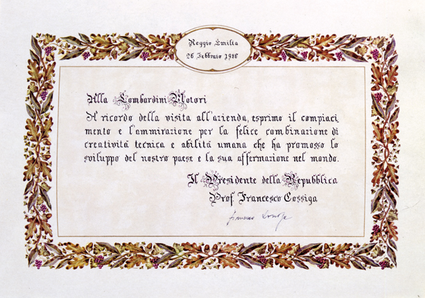 Documento rilasciato dal Presidente della Repubblica Francesco Cossiga a Lombardini. Testo: "Alla Lombardini Motori. In ricordo della visita all'azienda, esprimo il compiacimento e l'ammirazione per la felice combinazione di creatività tecnica e abilità umana che ha promosso lo sviluppo del nostro paese e la sua affermazione nel mondo. Il Presidente della Repubblica, Prof. Francesco Cossiga"